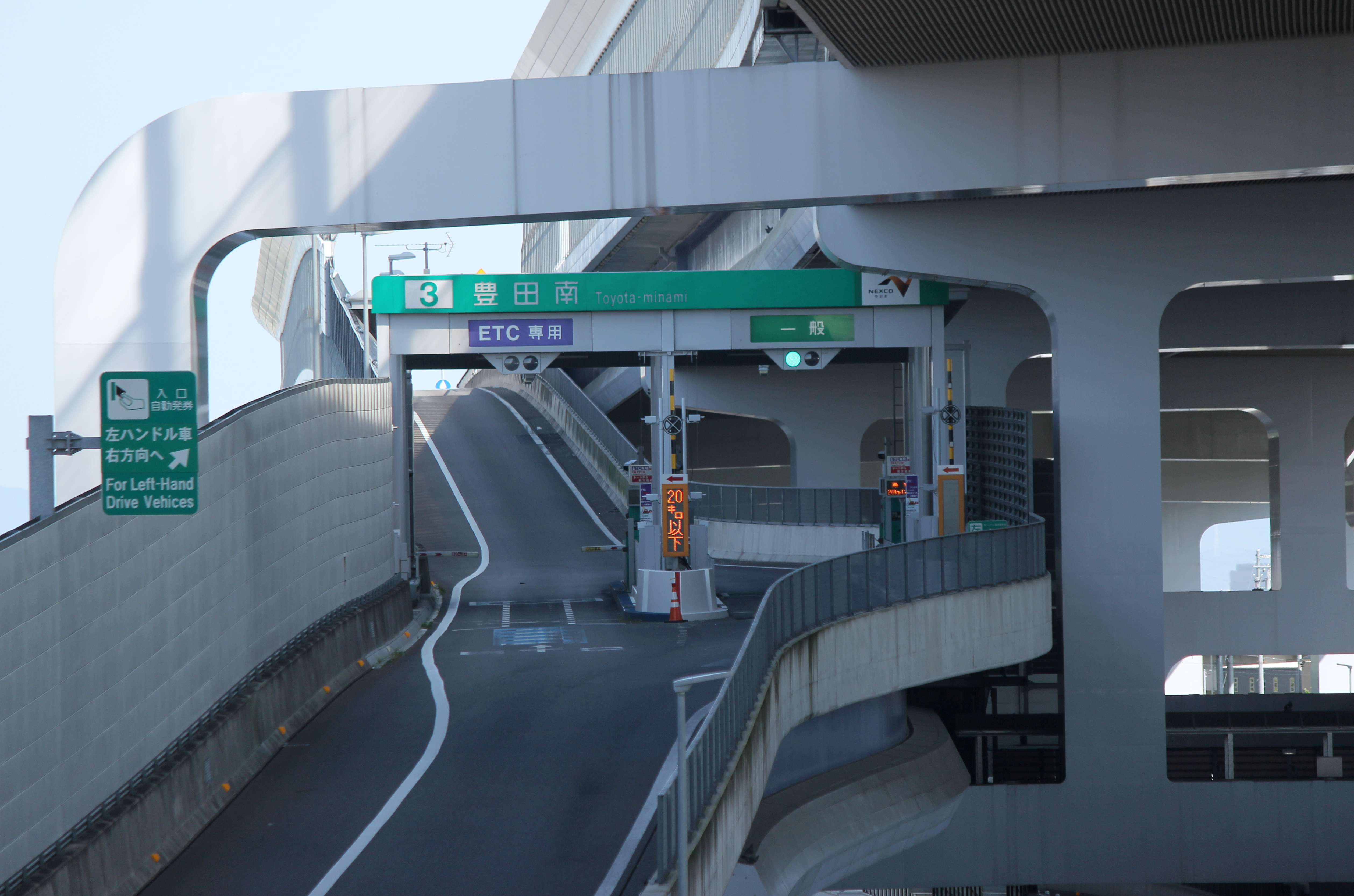 伊勢湾岸自動車道（第二東名）豊田南IC